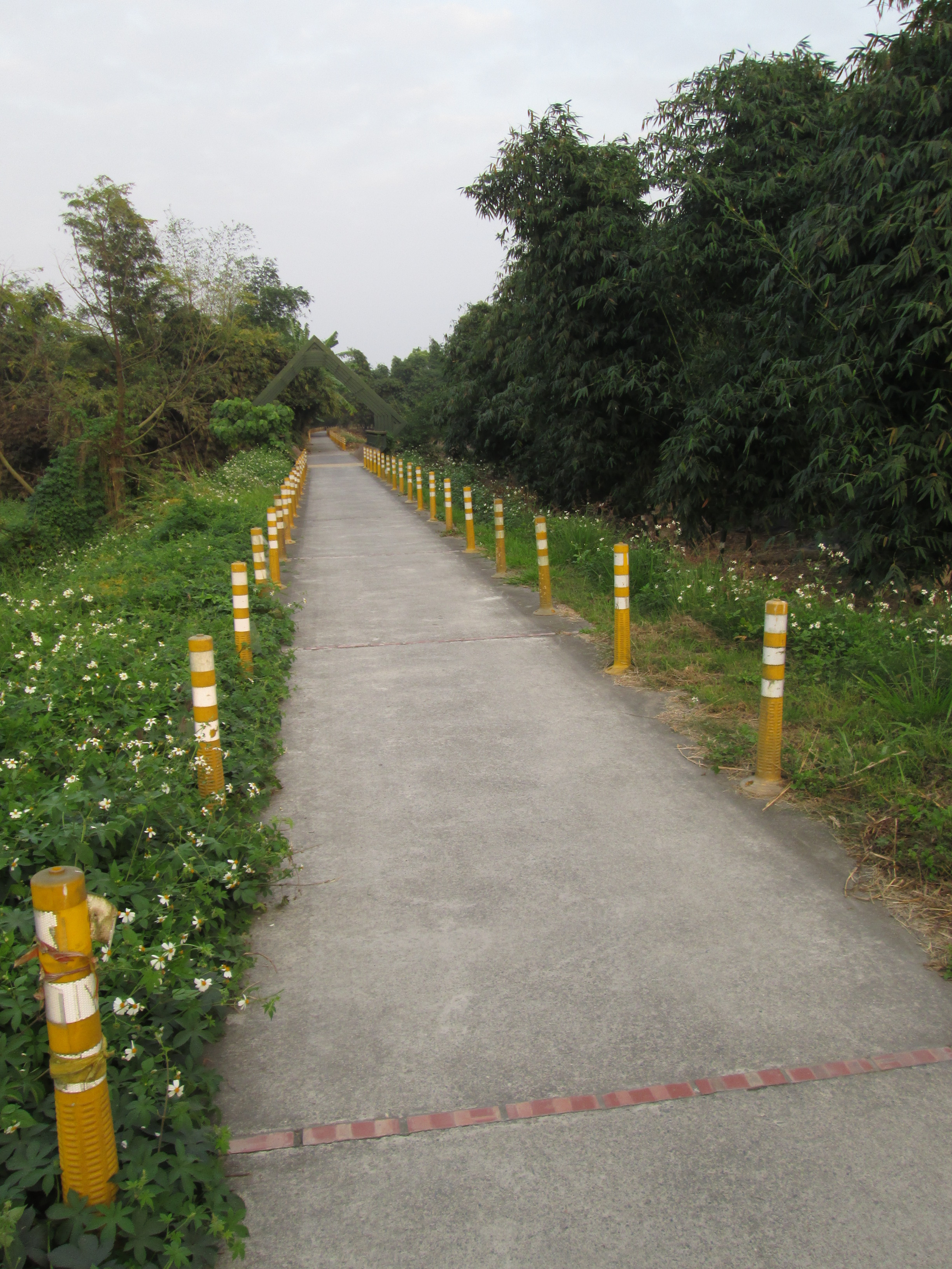 嘉義縣大林鎮 大林自行車道